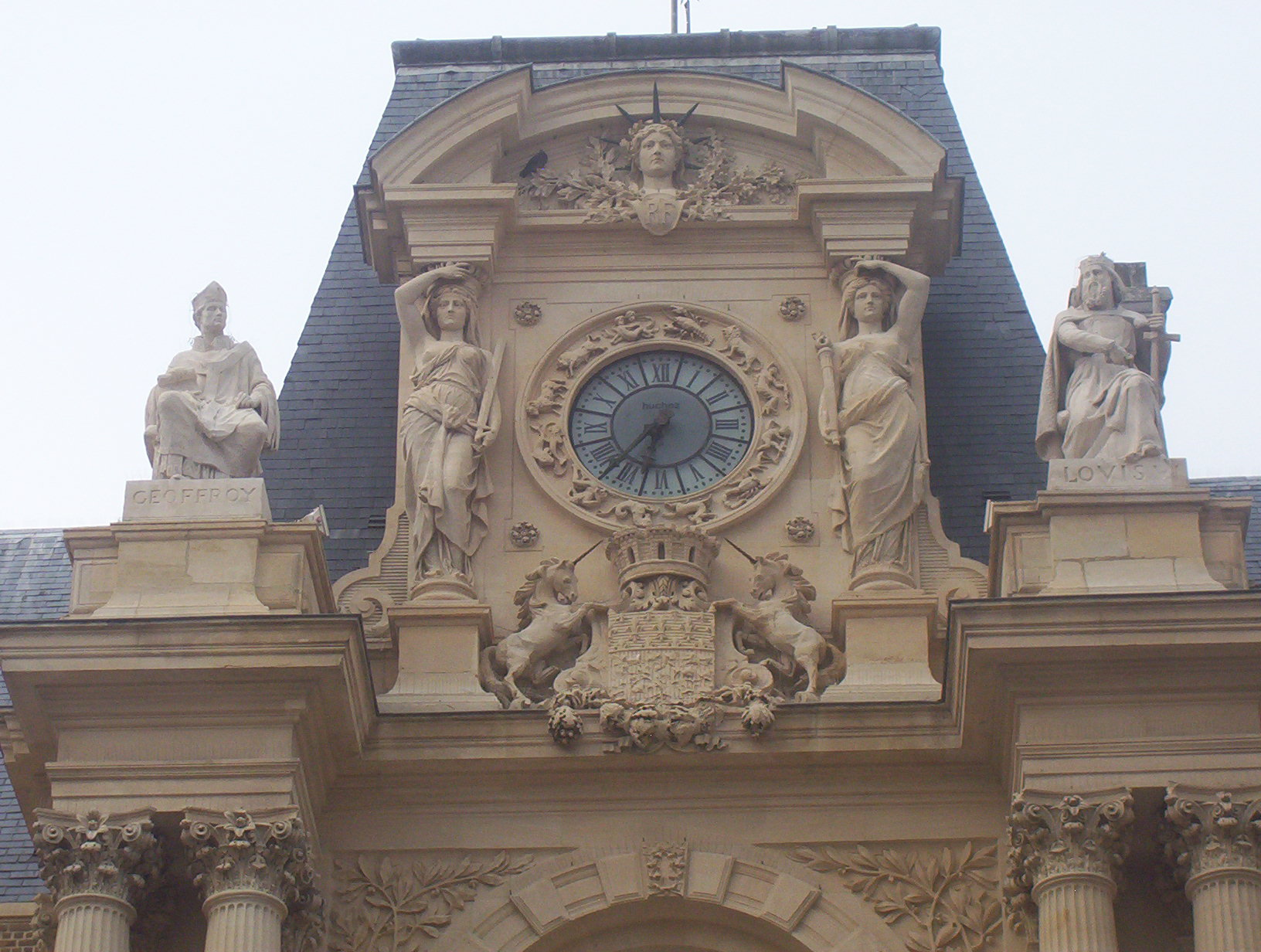 Hôtel de ville d'Amiens